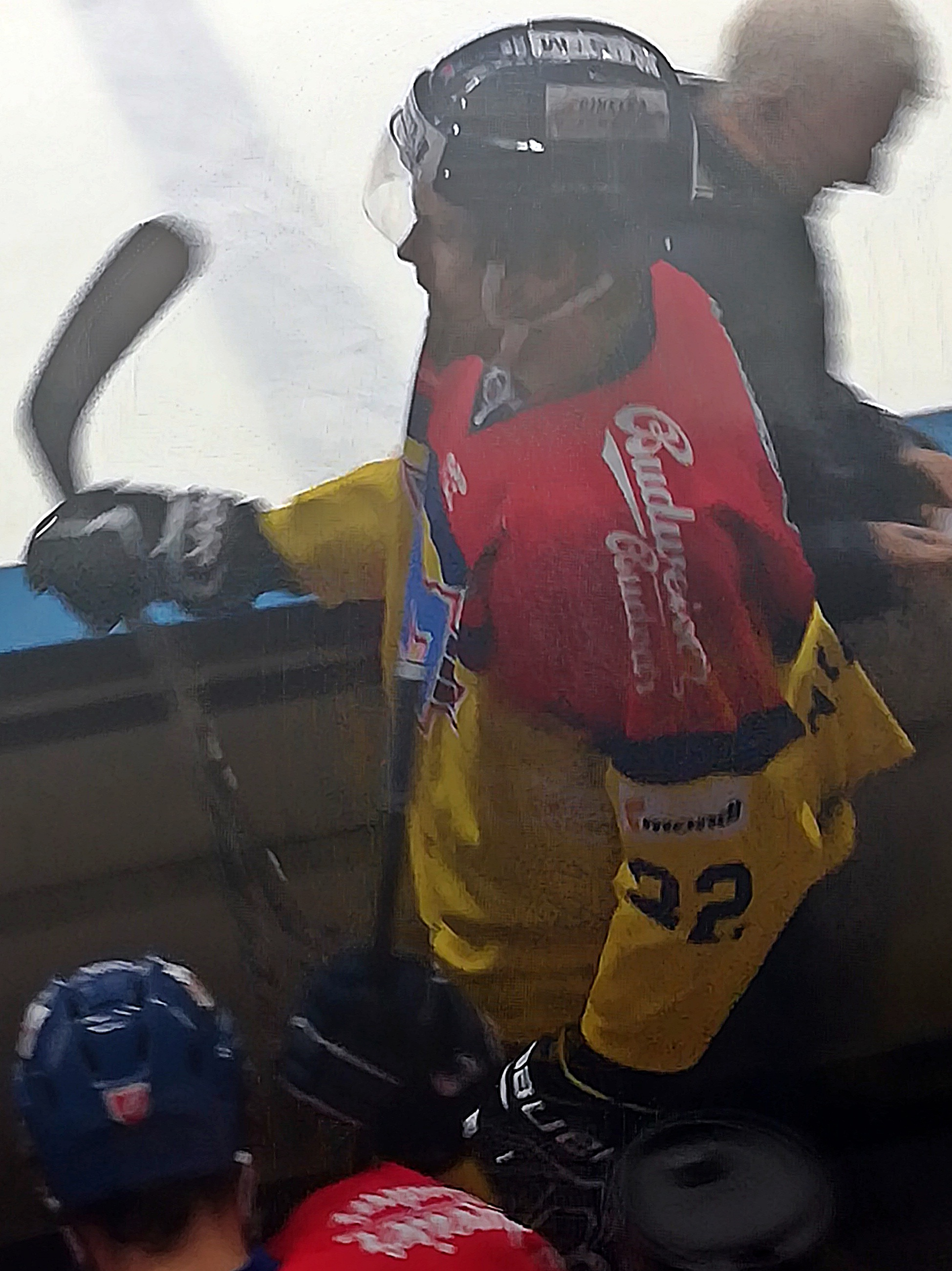 HC Zubr Přerov - ČEZ Motor České Budějovice